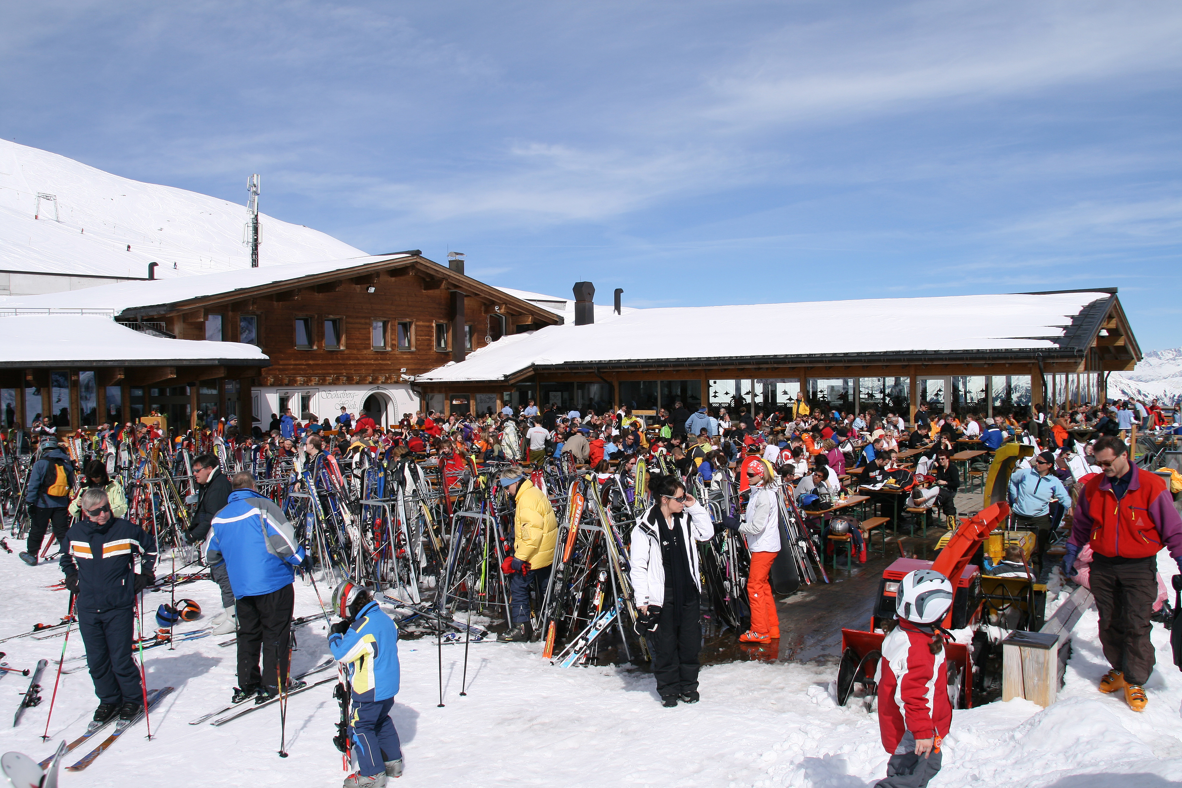 Bergstation-Restauration Schafberg-Hüsli in Gargellen im Rätikon, Vorarlberg.